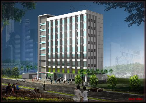 Phối cảnh Khu C - Trường Đại học Y khoa Phạm Ngọc Thạch